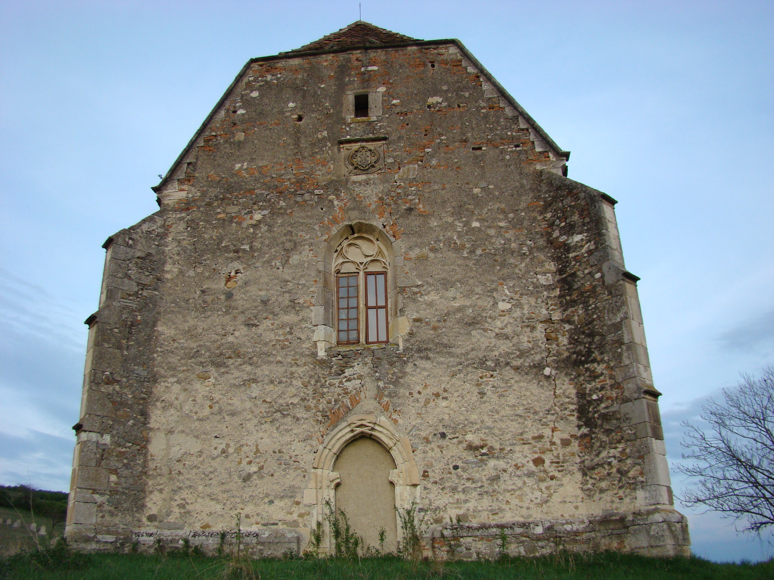 Evangelische Kirche von Vingard (Weingartskirchen), Alba, Siebenbürgen, Rumänien